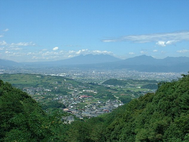 甲府盆地 山梨県東八代郡ja:中道町（撮影当時。現・甲府市）にて 右左口峠付近のja:国道358号 山の神橋から北西望 正面奥は八ヶ岳